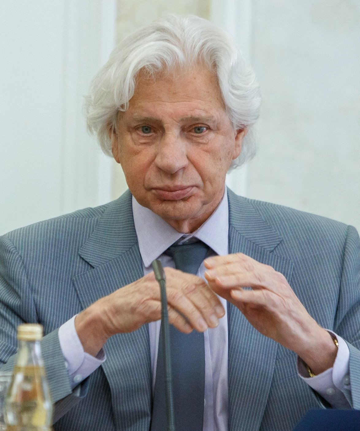 Генри Маркович Резник (род. 1938) — российский юрист